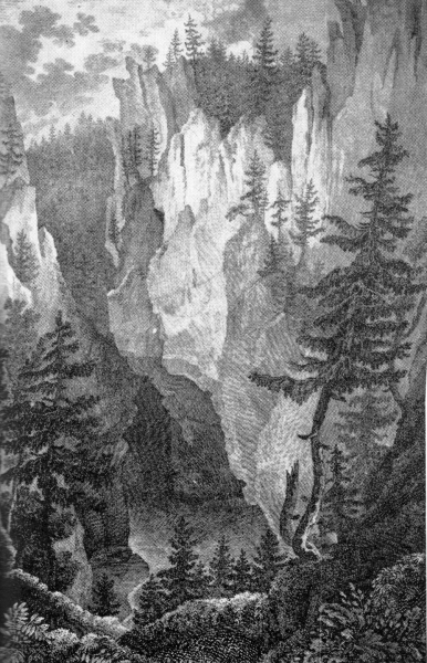 Macocha roku 1816